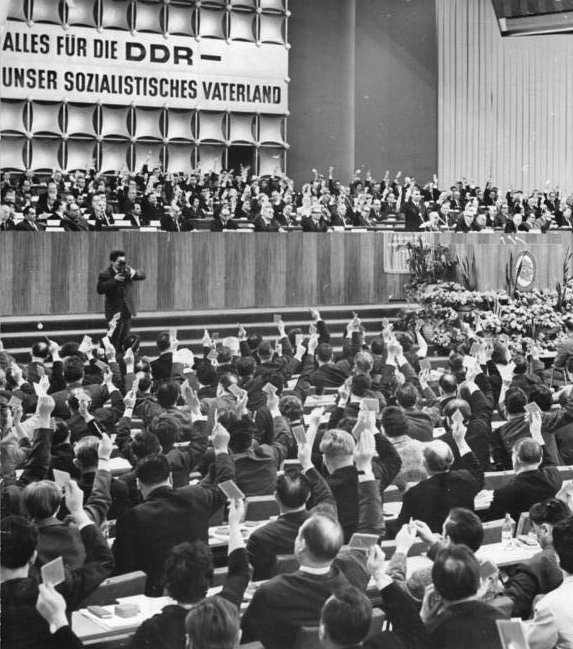 Zentralbild Sturm 21.4.1967 bgm-da. VII. Parteitag der SED - 21.4.1967. Die Delegierten stimmen über die "Erklärung des VII. Parteitages der SED gegen die Aggression der USA in Vietnam" ab."